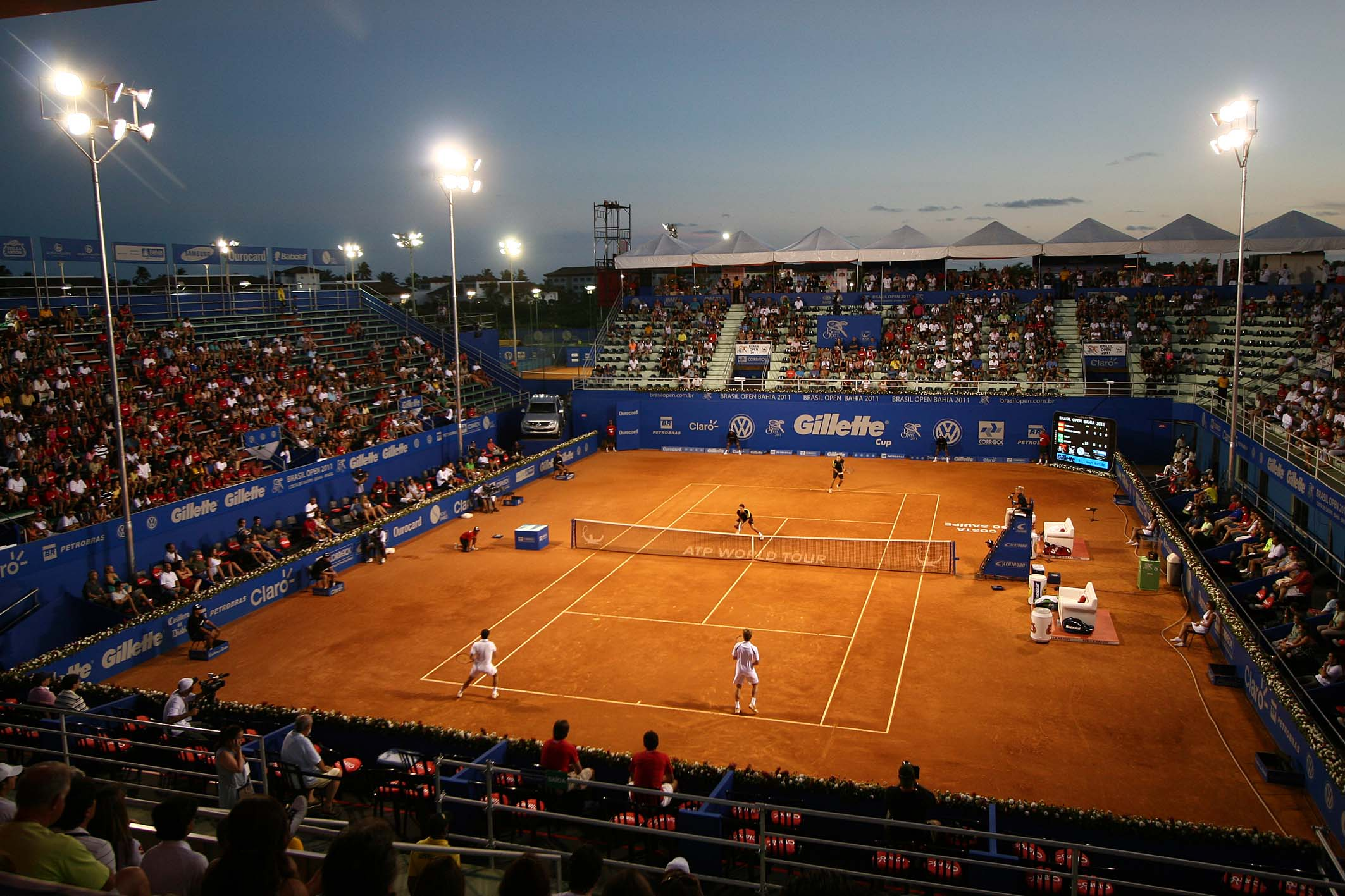 Brasil Open Bahia 2011. Foto: Mateus Pereira/AGECOM